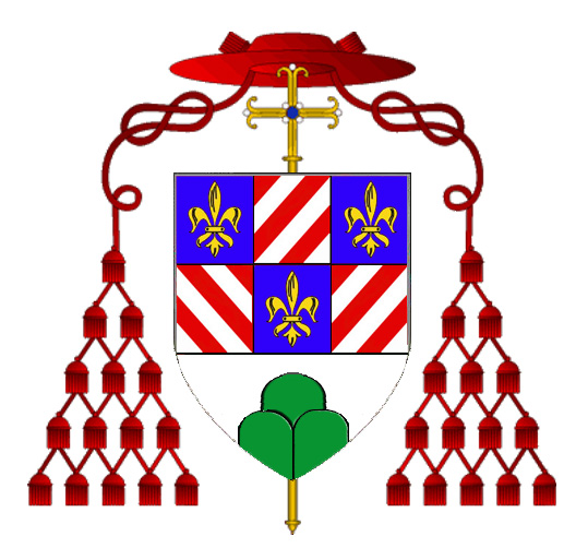 Stemma del cardinale Gaetano Bedini.